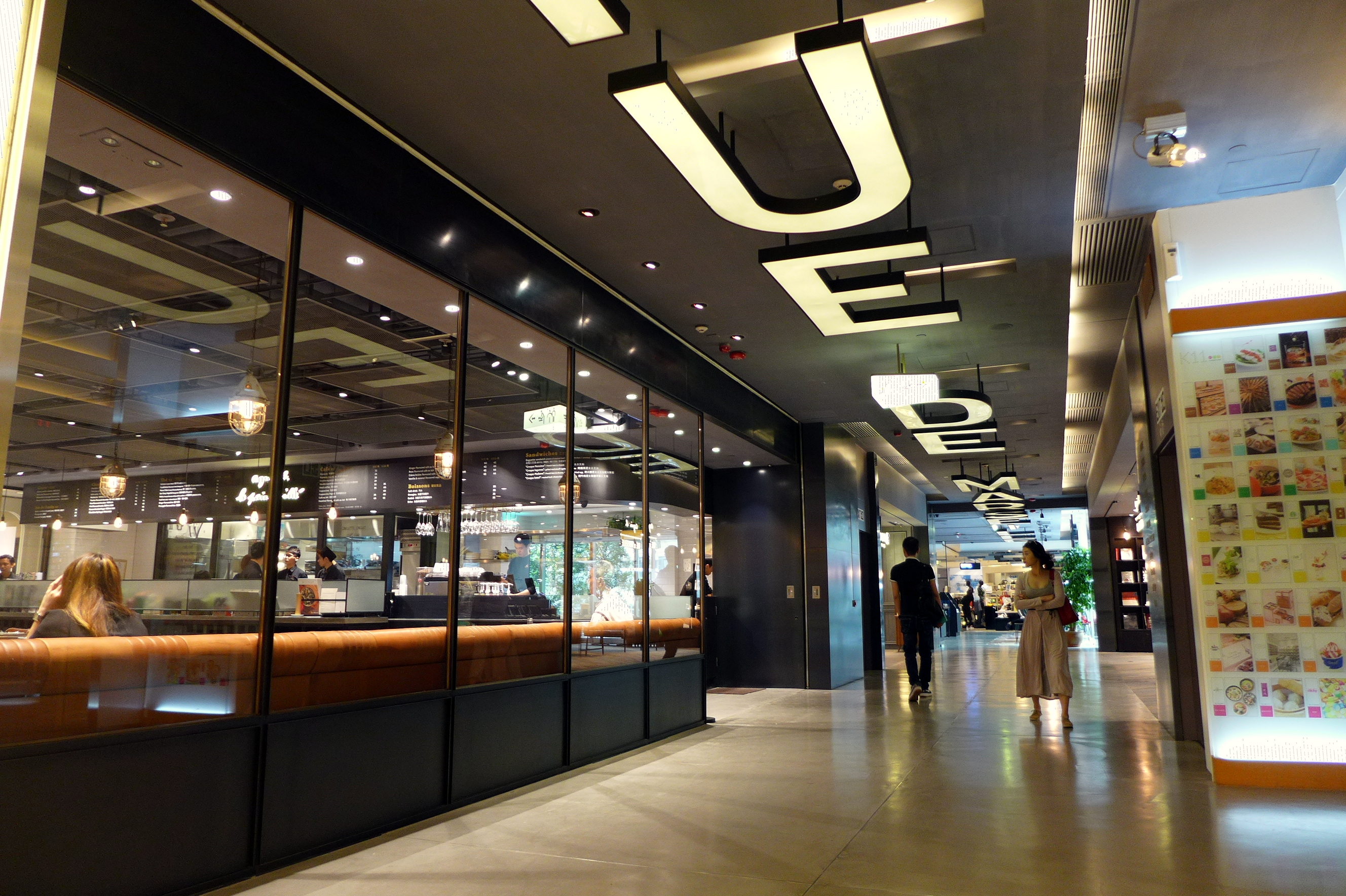 k11 agnes b